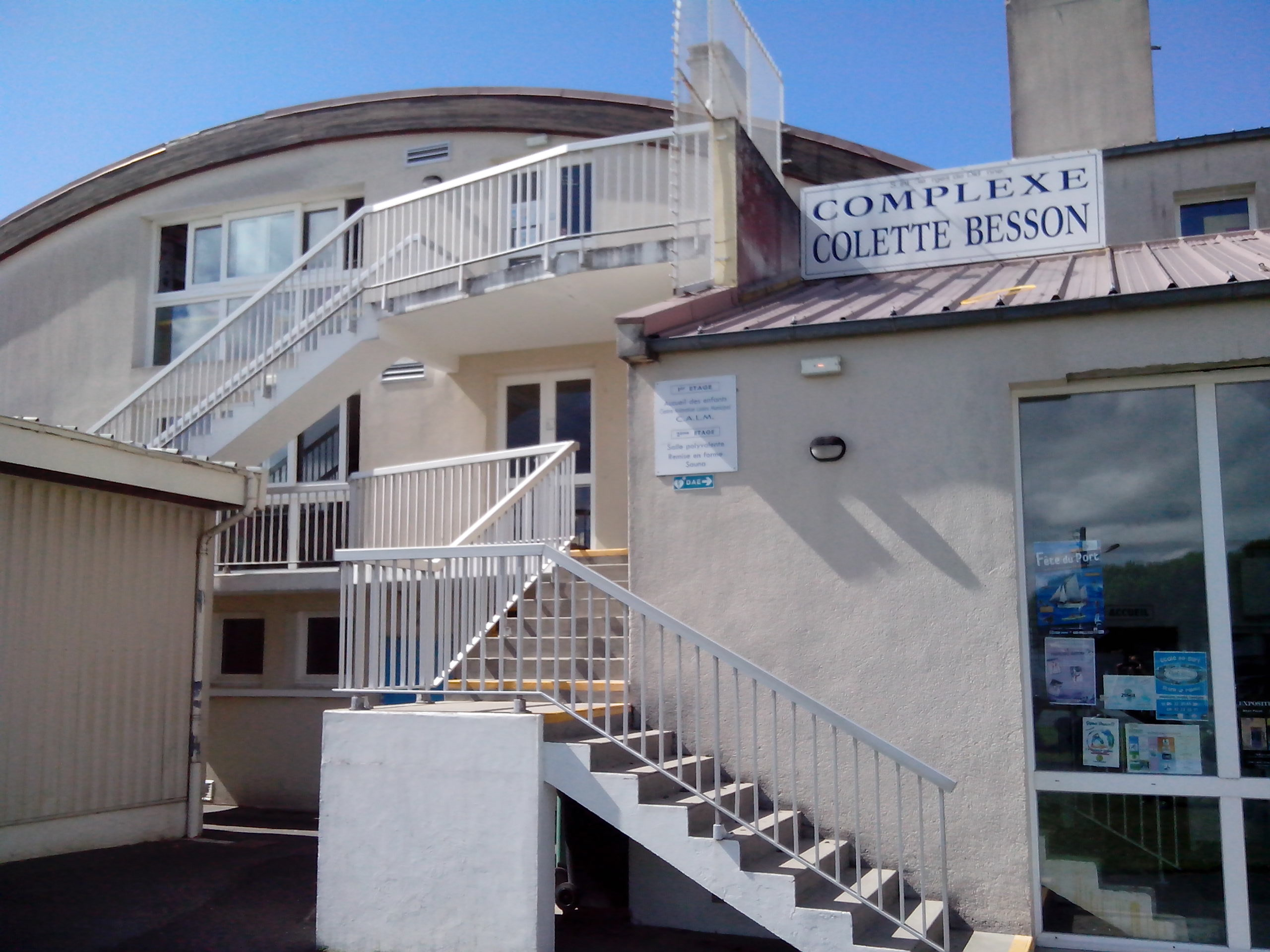 Complexe Colette Besson à St Georges-de-Didonne.